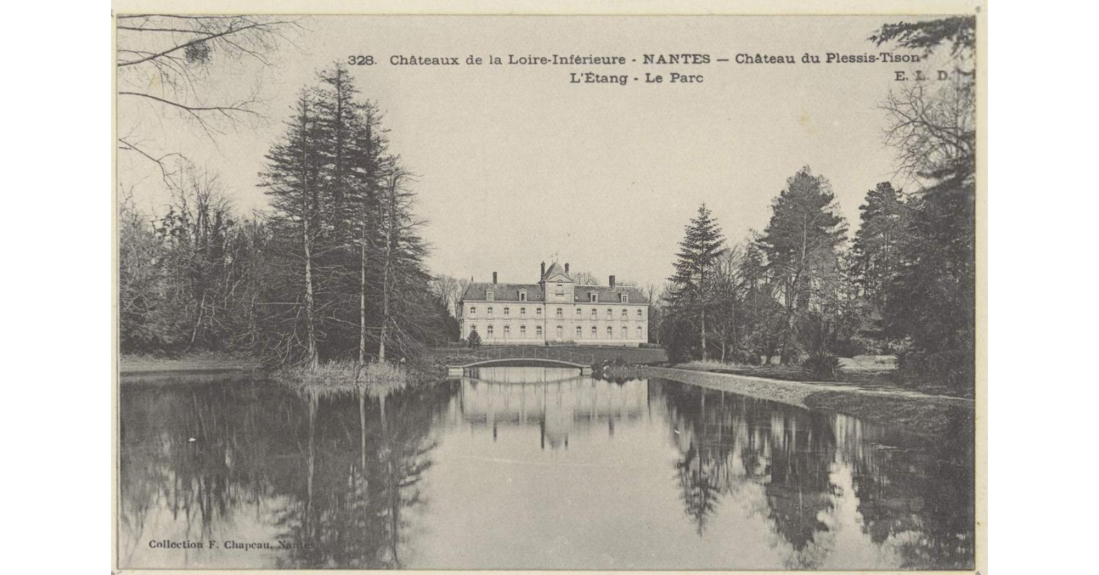 La façade Sud du château du Plessis Tison, au début du XXe siècle